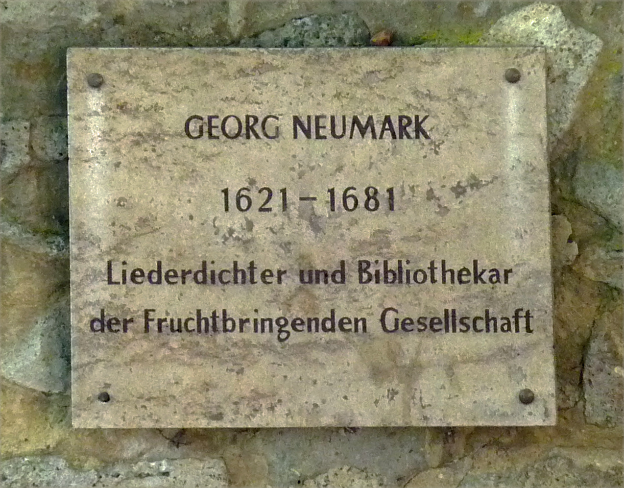 Jakobskirchhof an der Jakobskirche in Weimar, Tafel